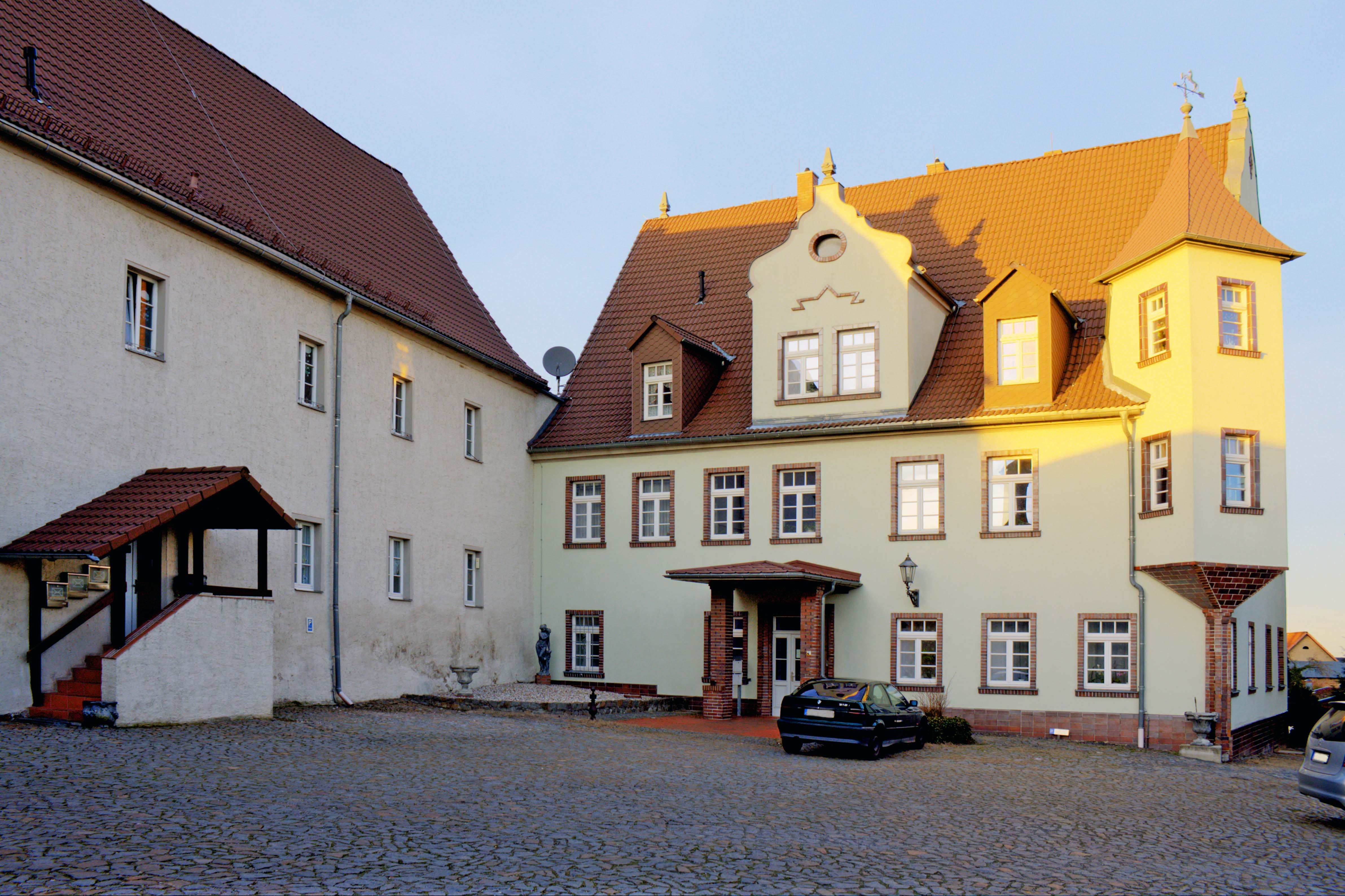 Herrenhaus, Steinhof 1; 2 in Thallwitz OT Böhlitz